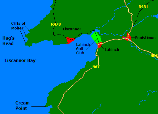 Mapa zatoki.